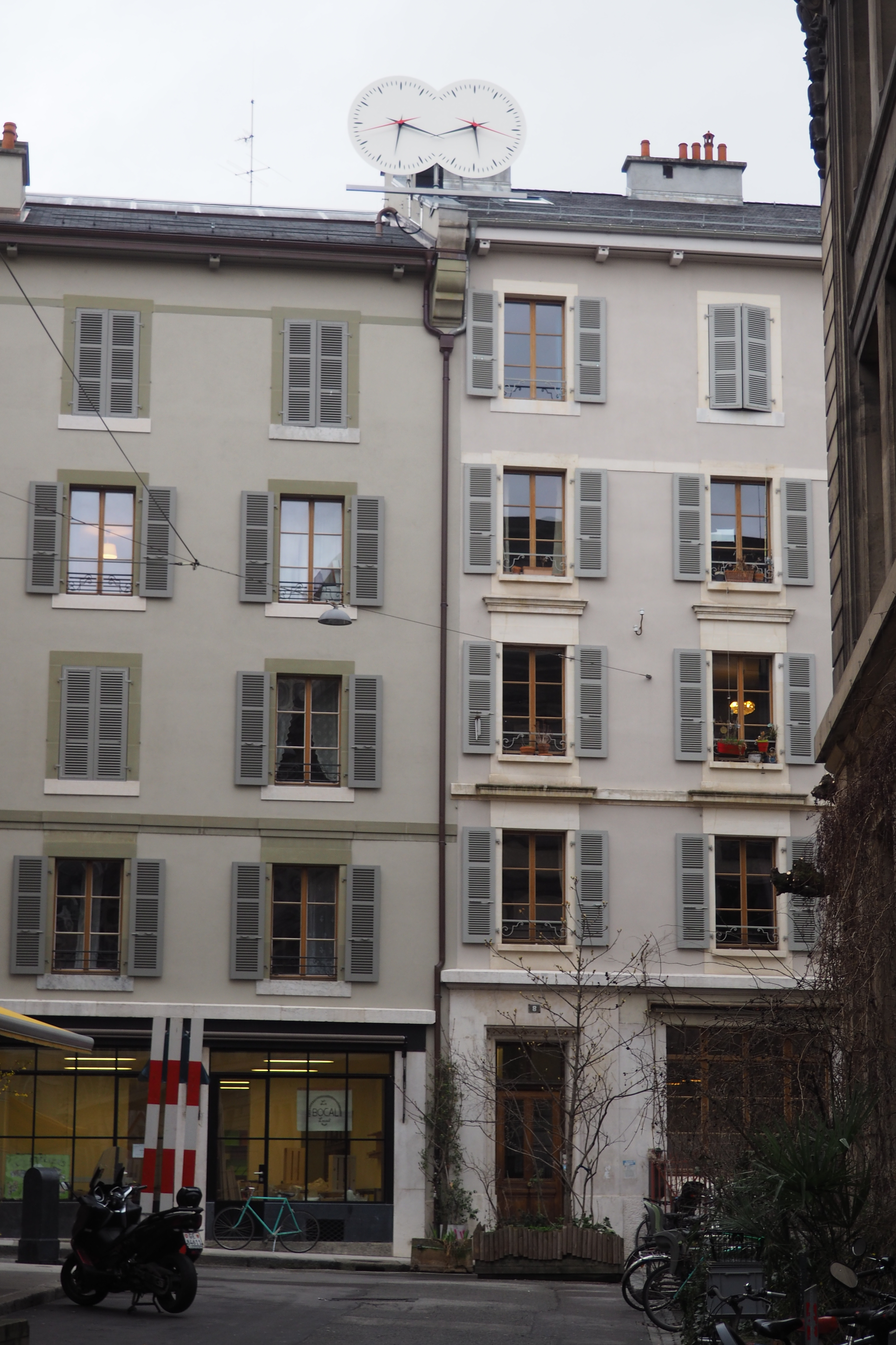 Rue Lissignol